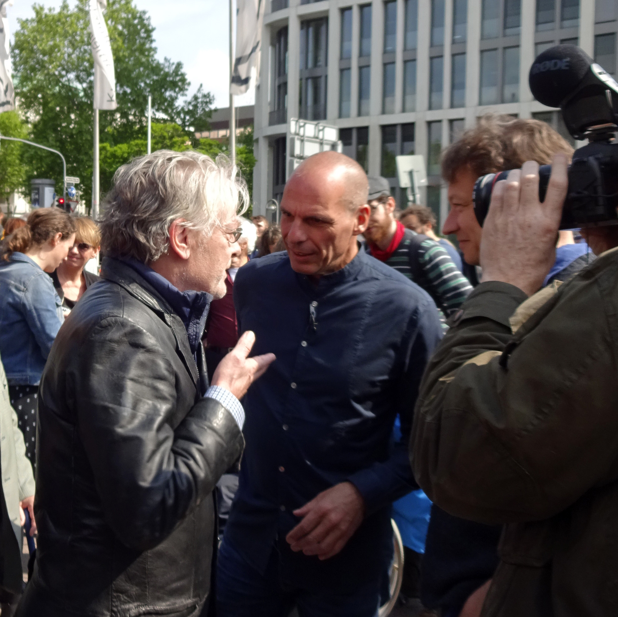 Yanis Varoufakis in Düsseldorf (Democracy in Europe Movement 2025 - DiEM 25), Grabbeplatz, 11. Mai 2019